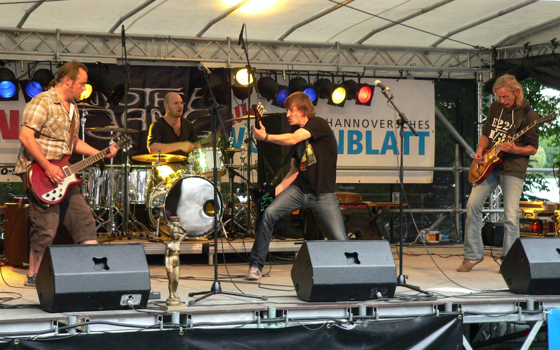 Motherjane beim Maschseefest